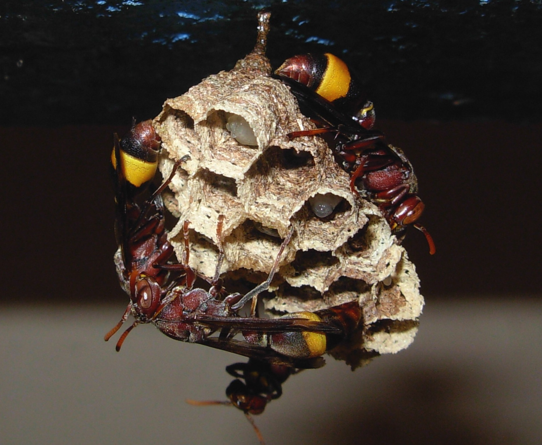 കൂടുണ്ടാക്കിക്കൊണ്ടിരിക്കുന്ന കടന്നലുകൾ,മുട്ടകൾ വിരിഞ്ഞുവരുന്ന കുഞ്ഞുങ്ങളും